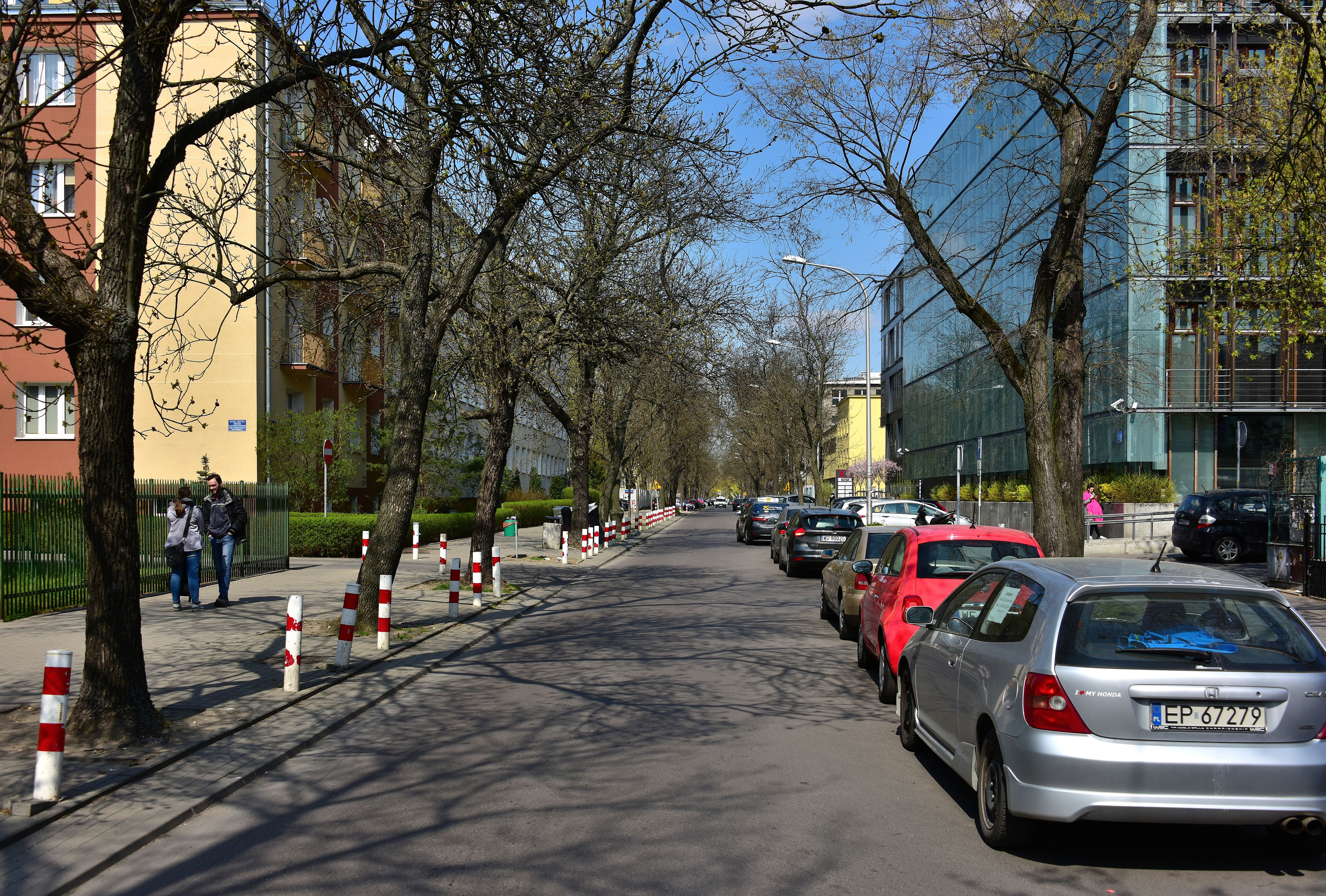 Ulica Czerska w Warszawie